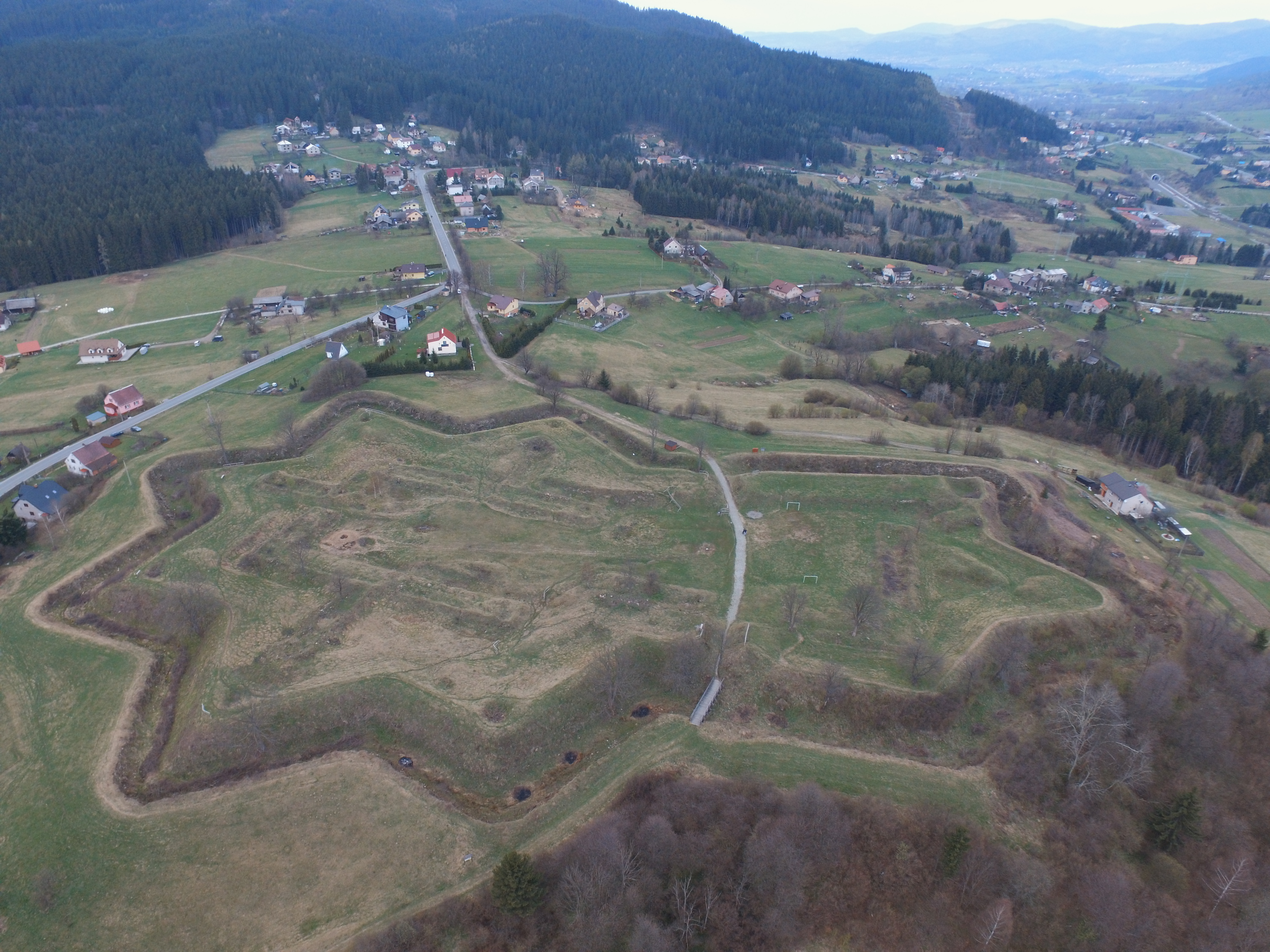 Fortyfikacja Szańców Jabłonkowskich w pobliżu przełęczy Jabłonkowskiej